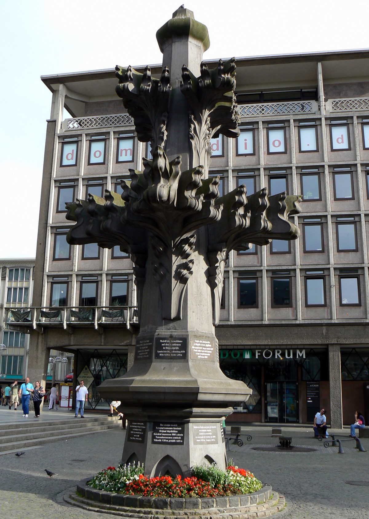 Modell der Kreuzblume auf den Domtürmen in Originalgröße. Standort: auf dem Domplatz in Köln.